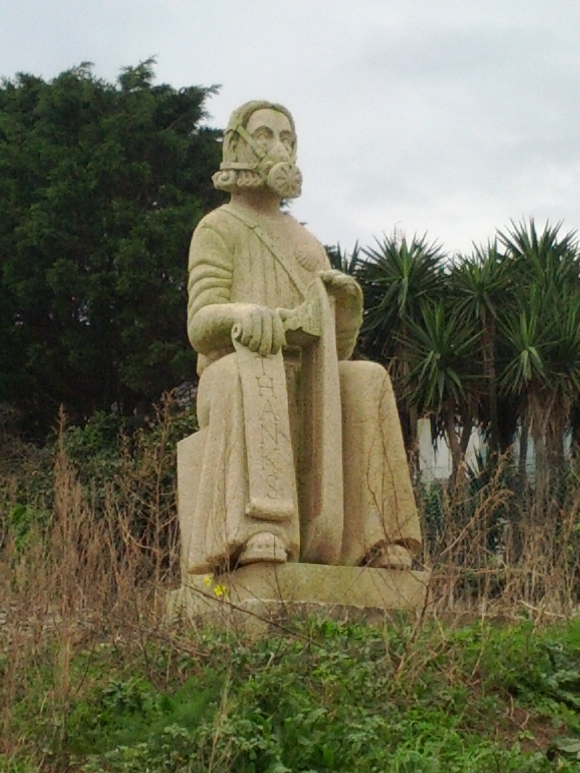 Estatua do apóstolo Santiago en Porto do Son. Recordatorio da marea negra sufrida na costa galega logo da crise do Prestige.